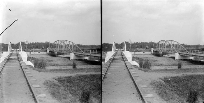 Negatief. Een trambrug en een brug voor gewoon verkeer over de rivier Konto, Kediri, Oost-Java